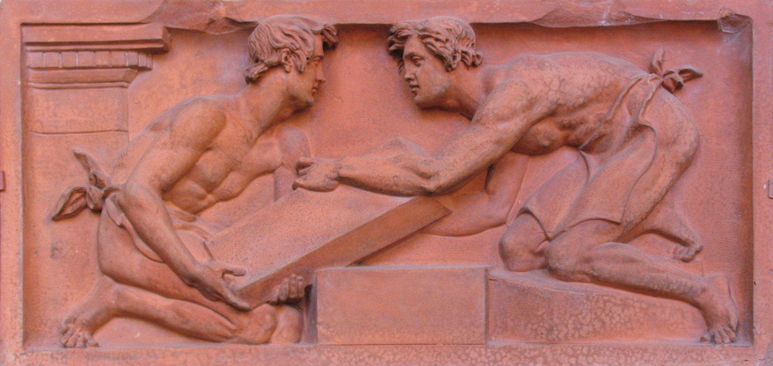 Berlin, Bauakademie. Terrakotten in den Fensterbrüstungend des 1. Stockes: Setzend des Grundsteins